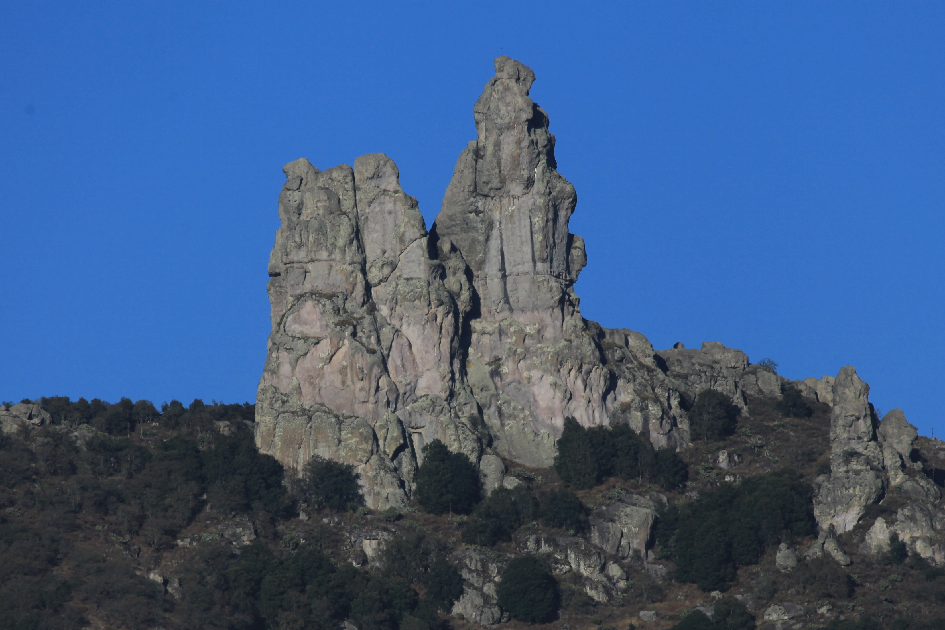 Los Frailes